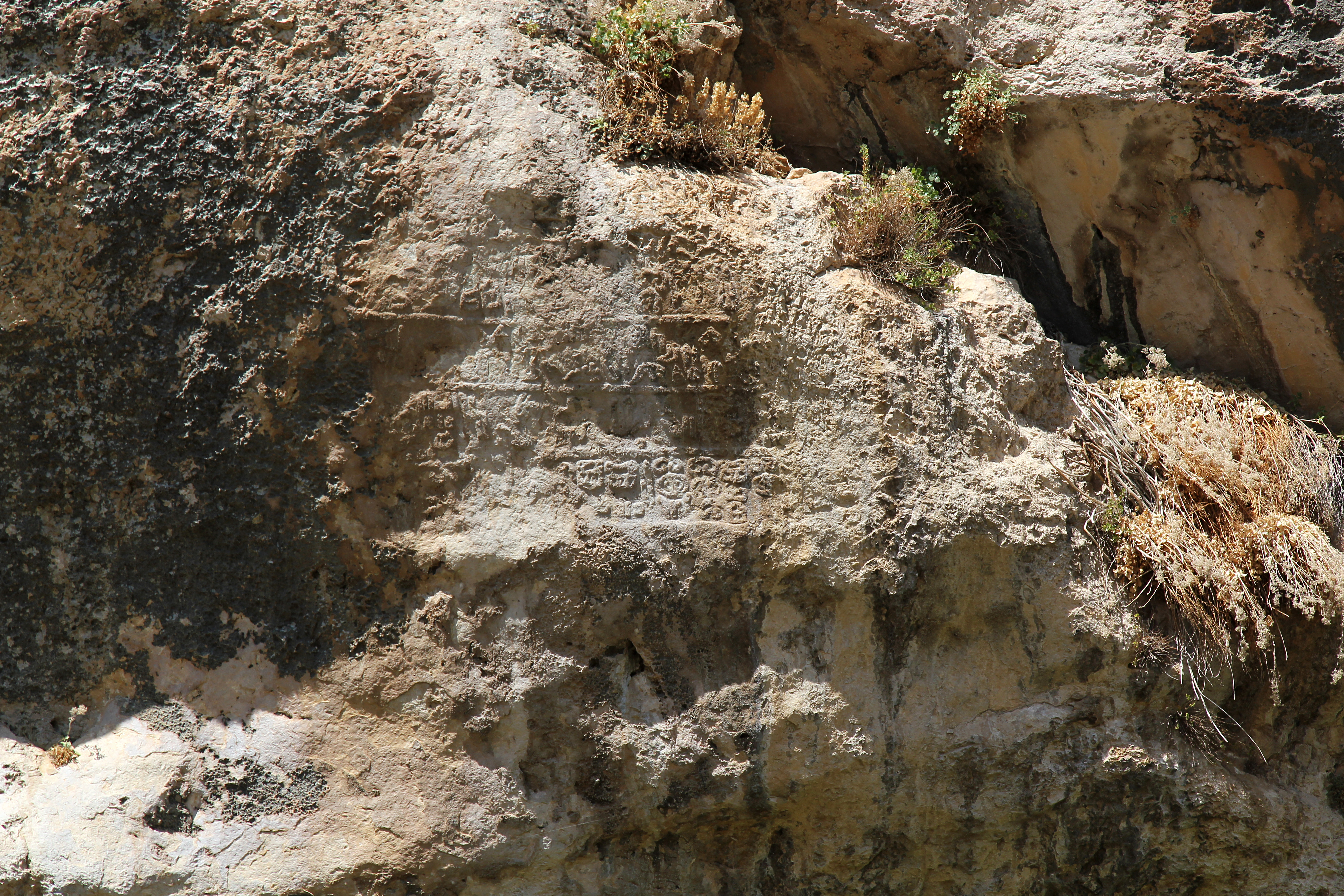 Luwische Felsinschriften von Gürün, Zentraltürkei, Untere Inschrift "Gürün A"